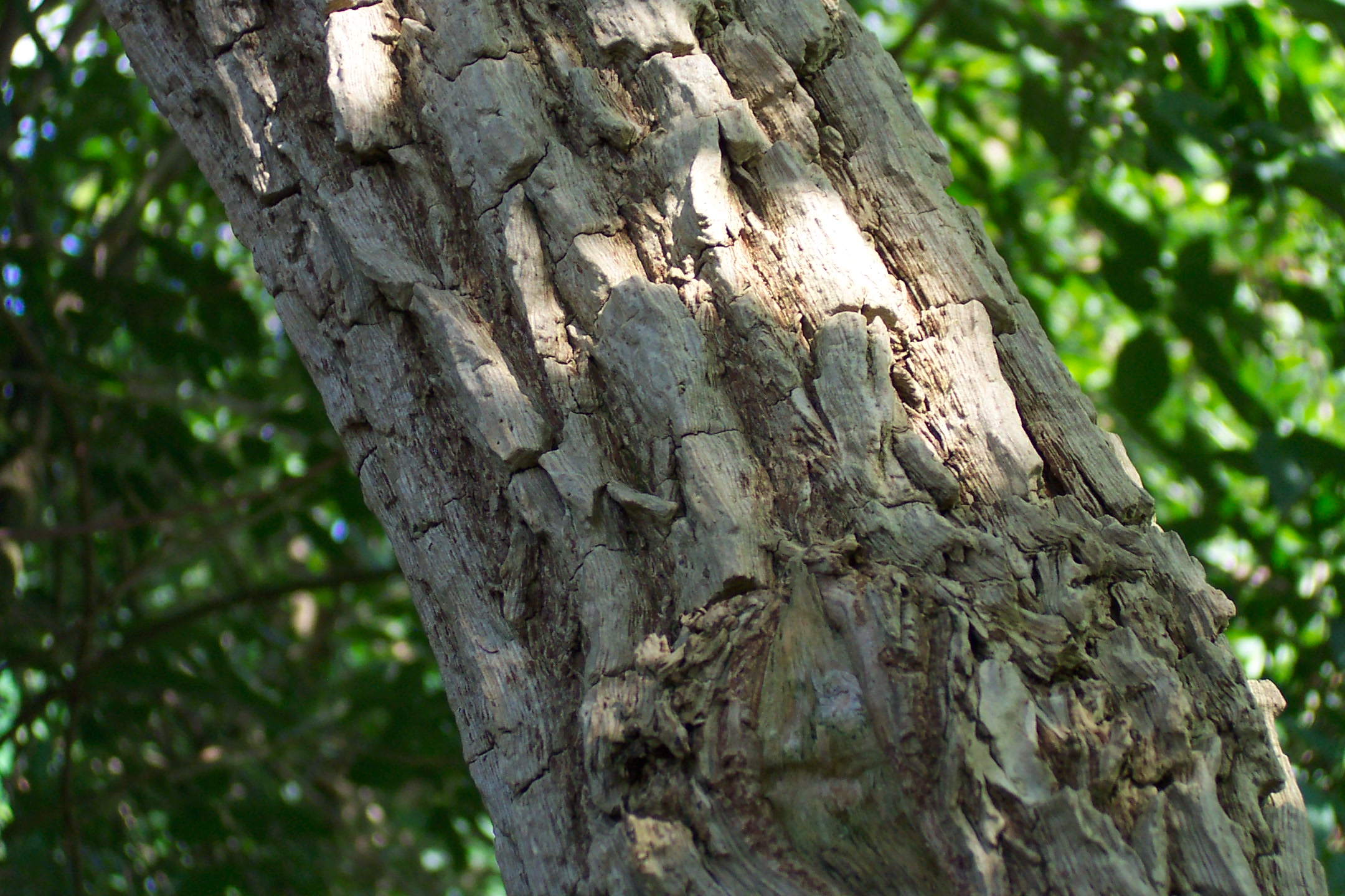 Sambucus nigra (Cortex)